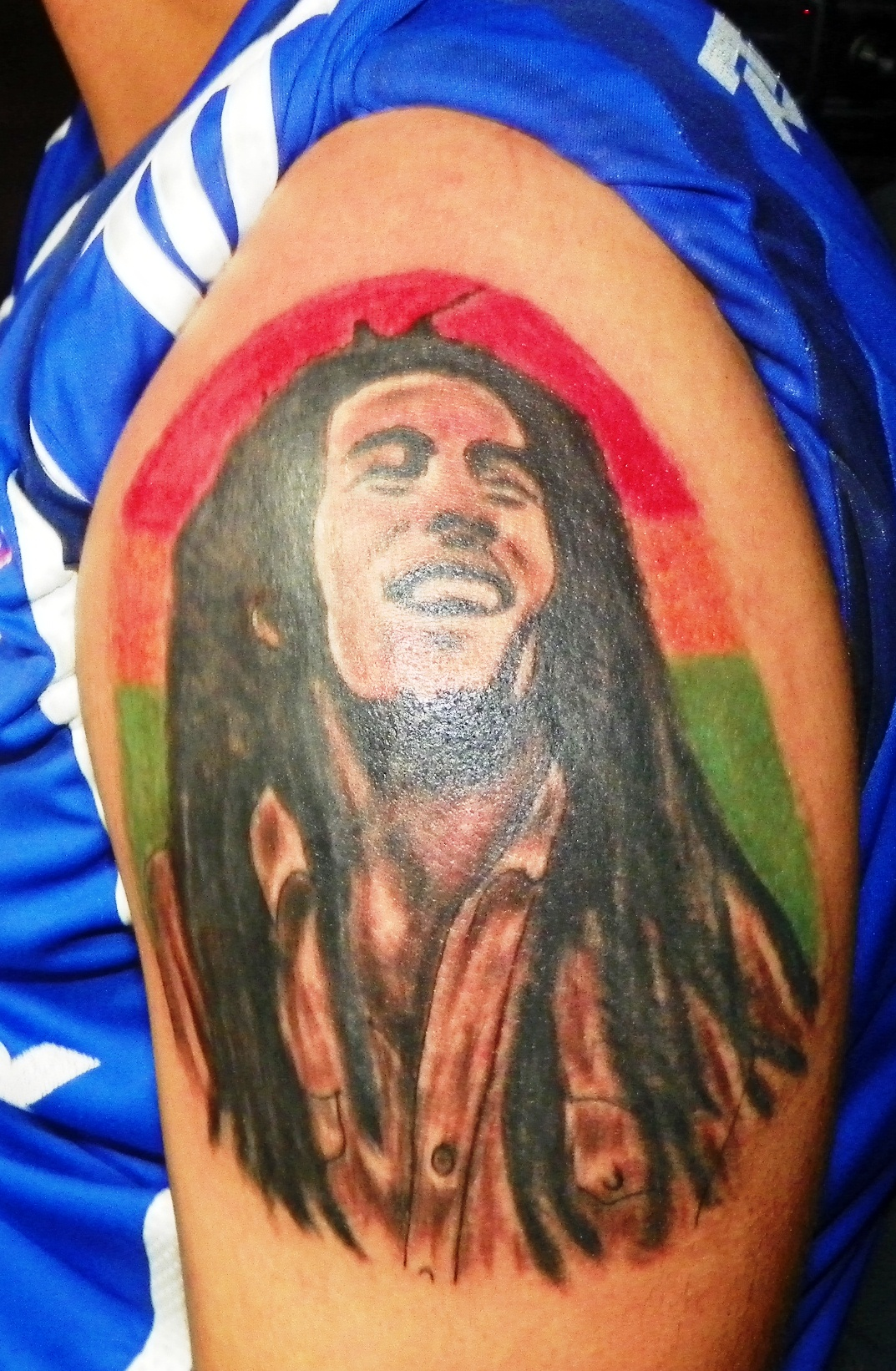 tatuaje realizado por cristian cordova tattoo del mono chile